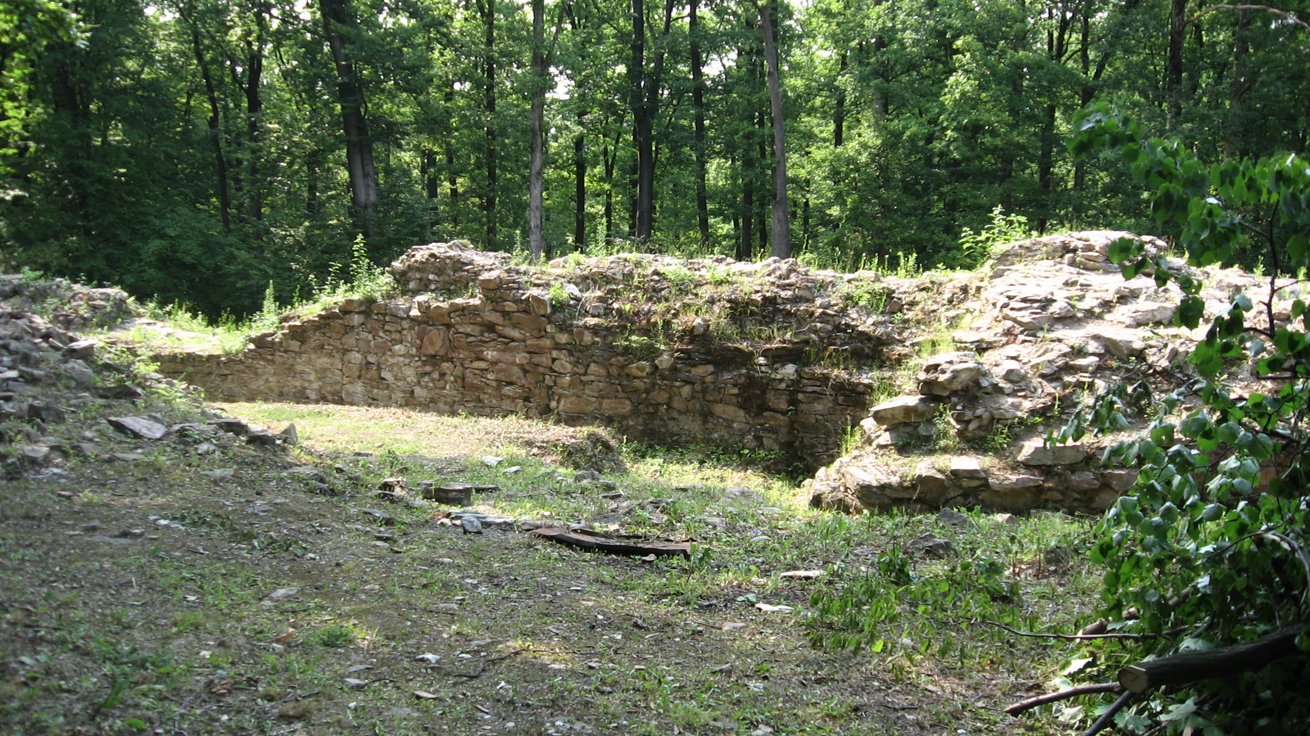 Okrúhla veža Košického hradu.